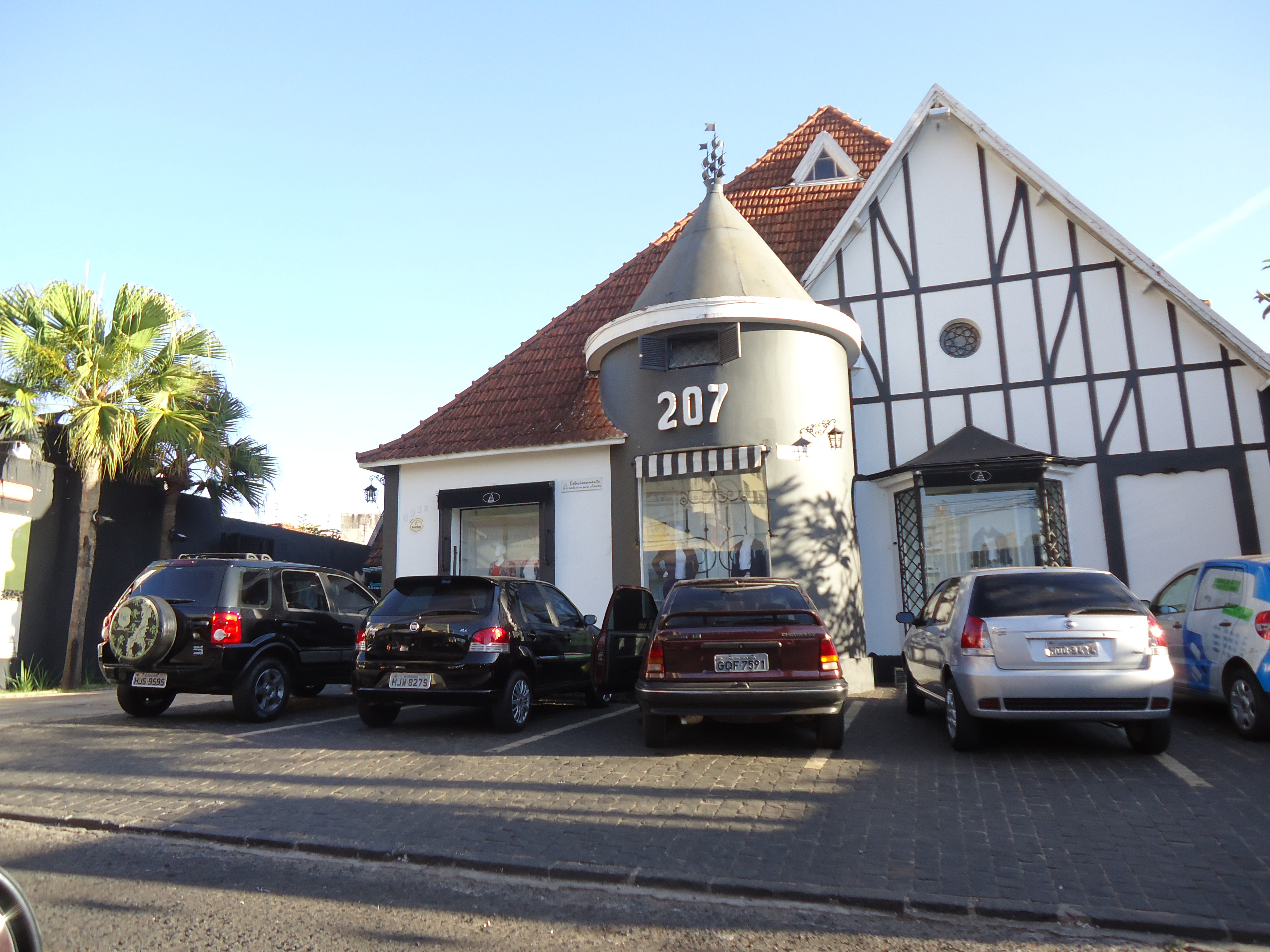 Vila 207, na Rua Goiás, no Centro de Uberlândia - MG.